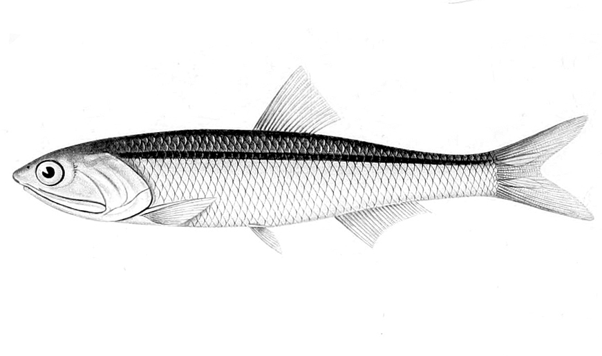 Engraulis ringens